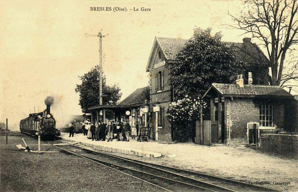 Train entrant en gare.